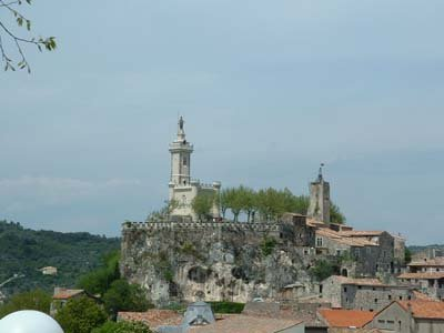 Ville de Saint-Ambroix et du Dugas. Le rocher du Dugas à Saint-Ambroix (Gard).